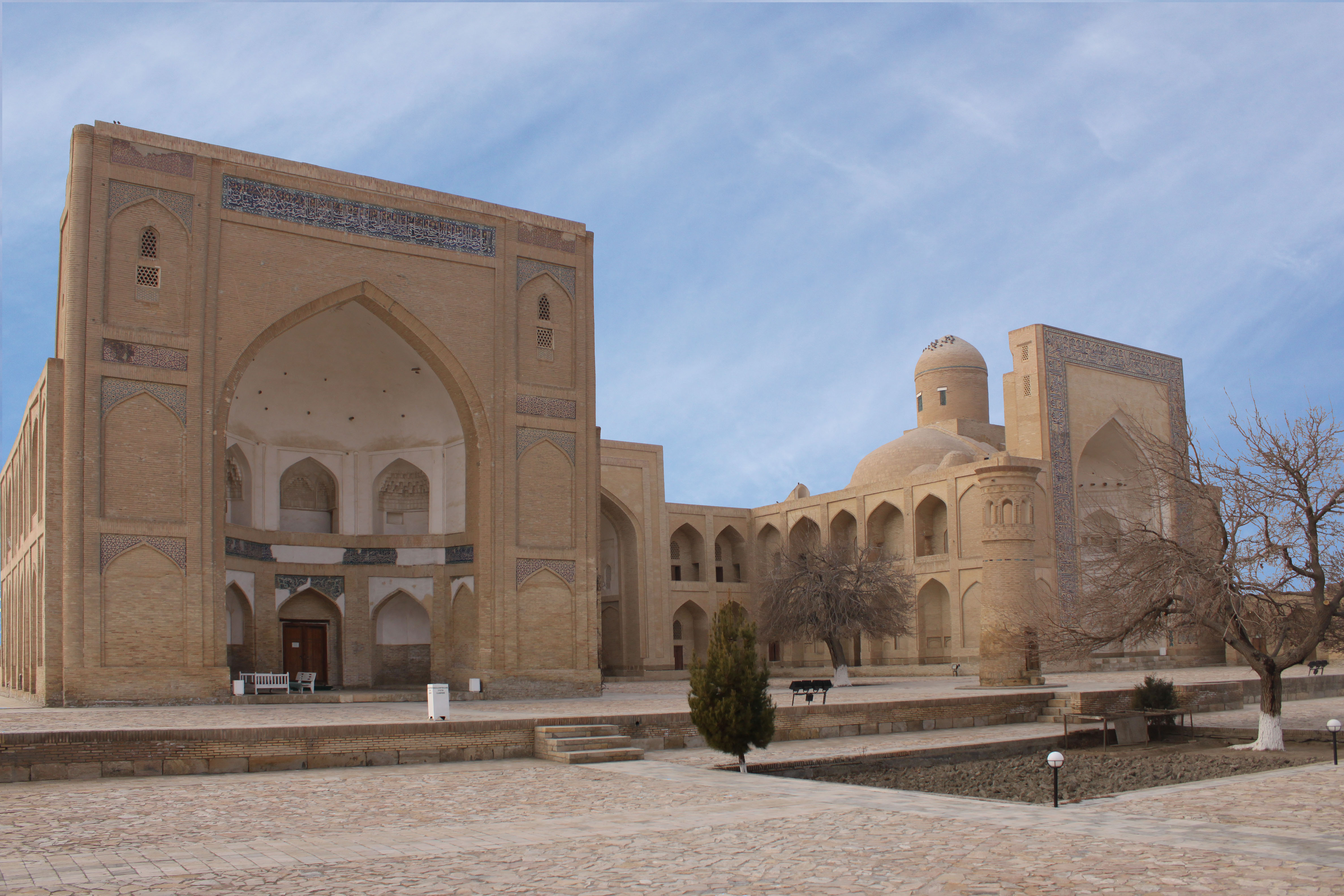 Комплекс Чар-Бакр. Ханака, медресе и мечеть